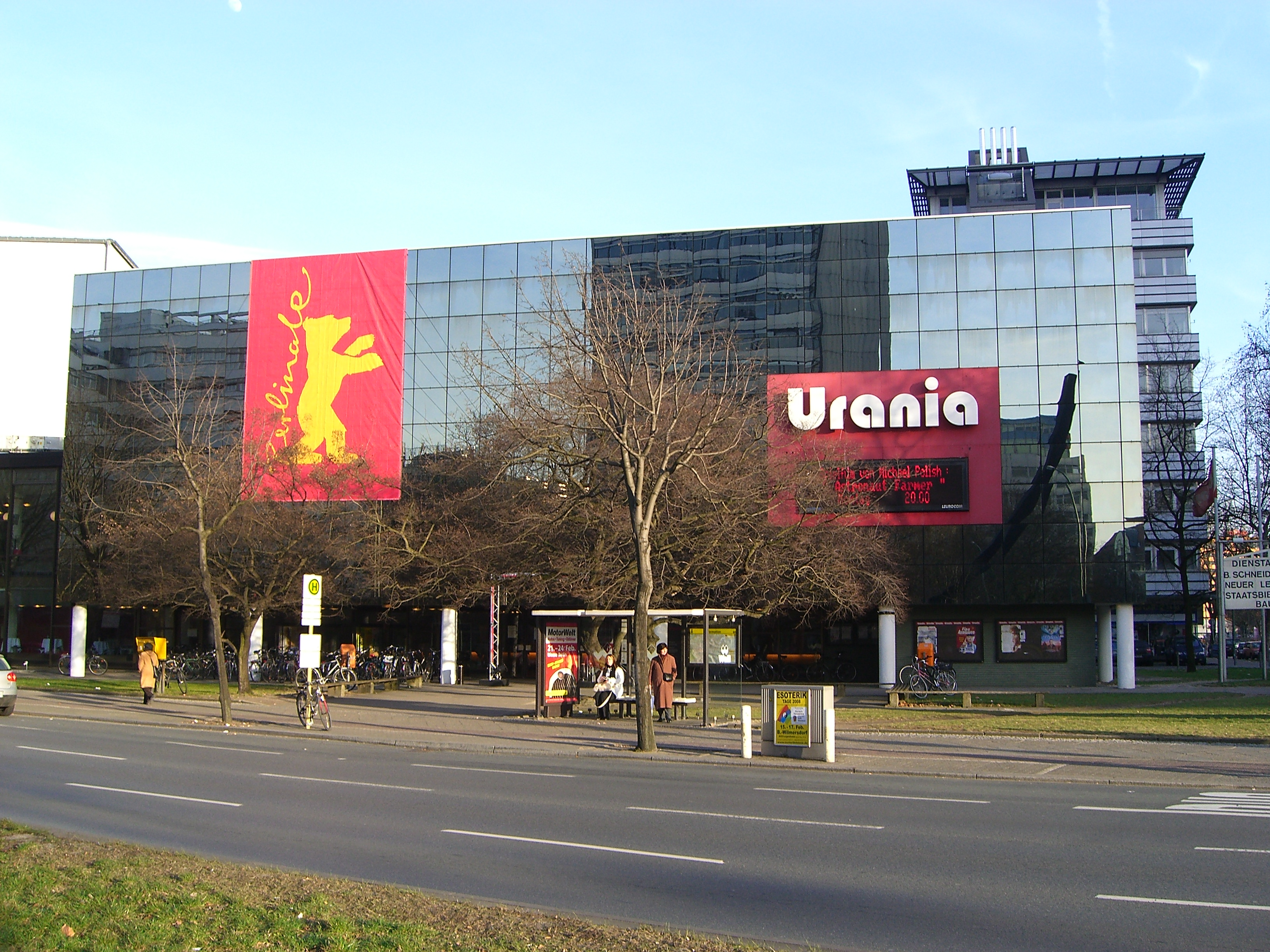 Urania-Filmbühne Berlin während der Berlinale 2008.